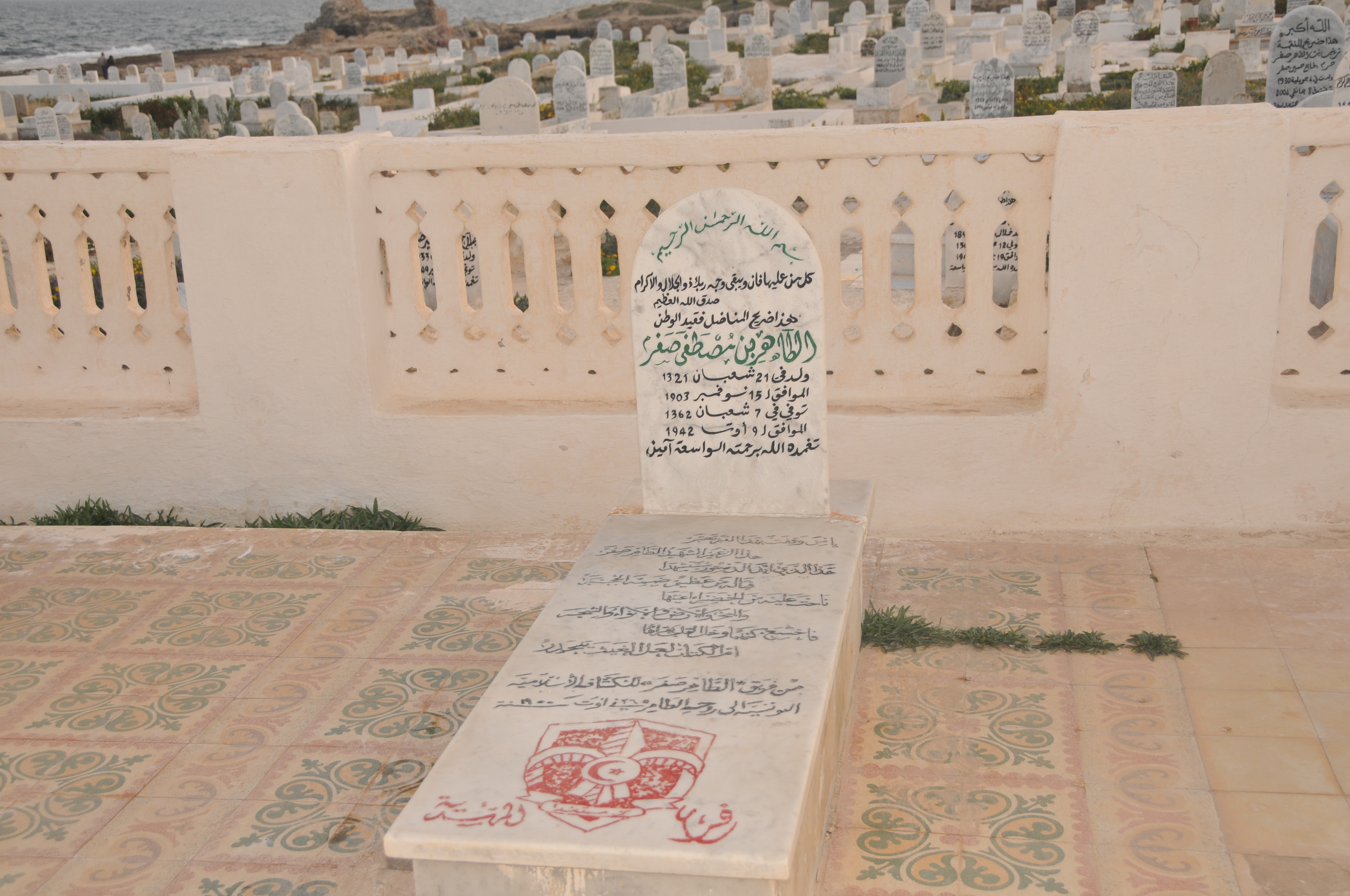 Tombe de Taher Ben Mustapaha Sfar au cimetère marin de Mahdia